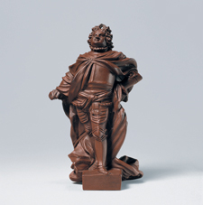 Statuette Augusts des Starken aus Böttgersteinzeug Modell wohl von Johann Joachim Kretzschmar, um 1713 Ausformung um 1713/20 Meißener Porzellan-Sammlung Stiftung Ernst Schneider in Schloss Lustheim